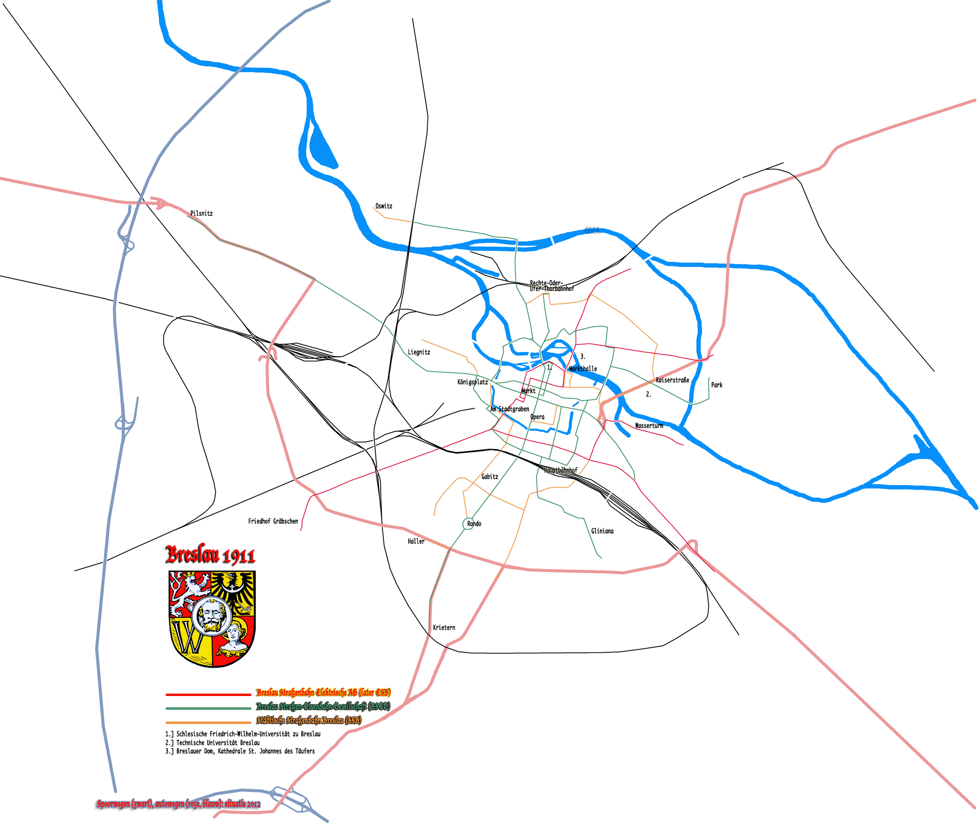 3 Trambedrijven in Breslau (Wroclaw); situatie 1911